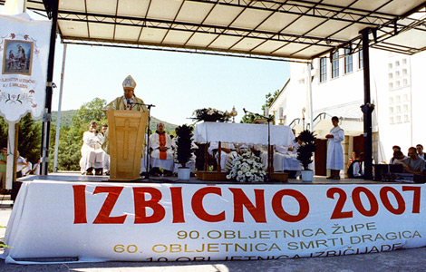 Misa na Izbičijadi 2007. godine u Izbičnu.